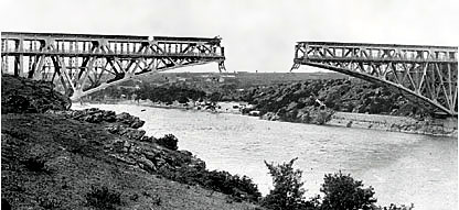 Взорванный Кичкасский мост